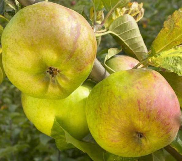 Rambour d'hiver